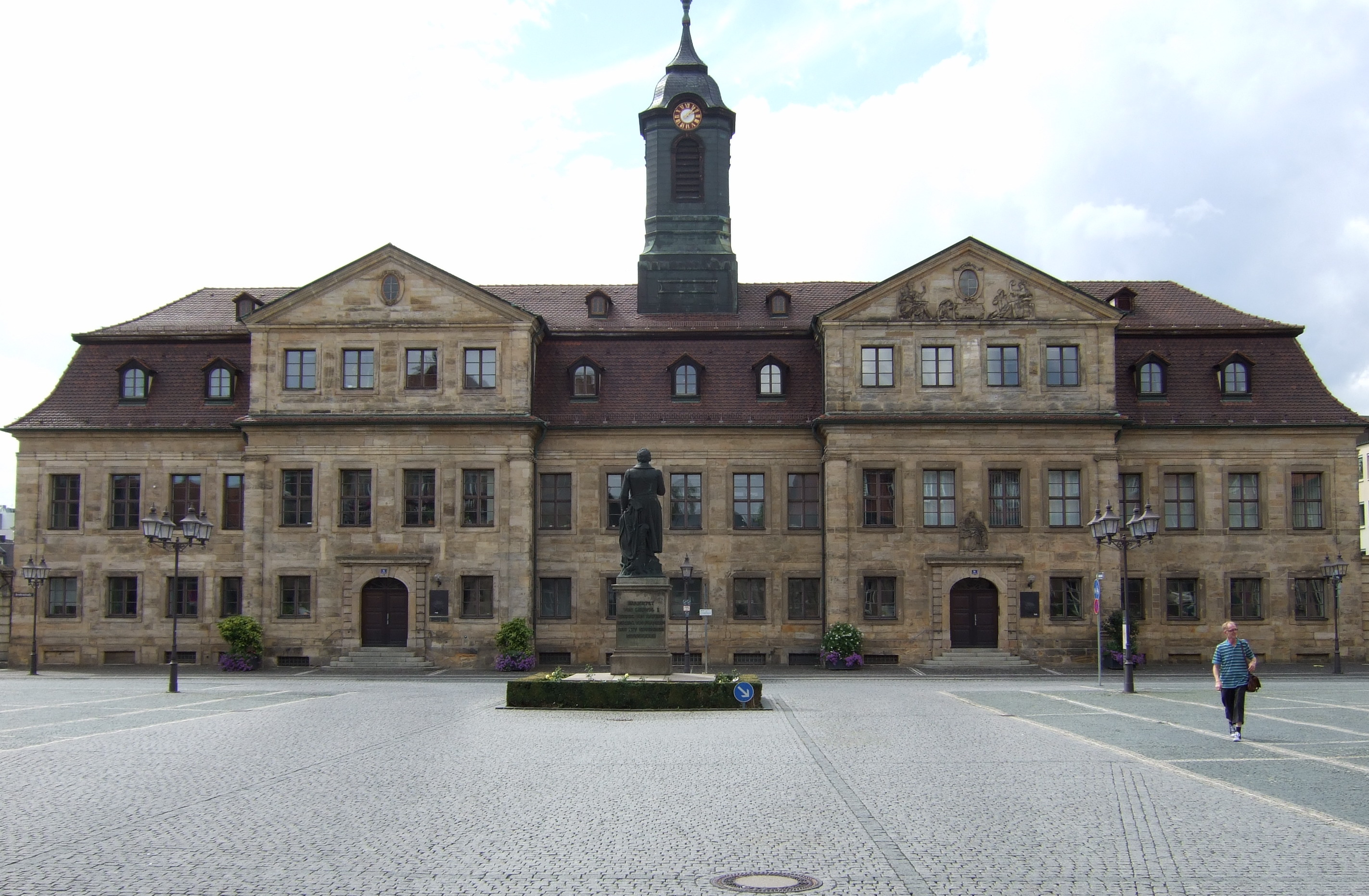 Bayreuth ehemaliges Waisenhaus Friedrichstraße